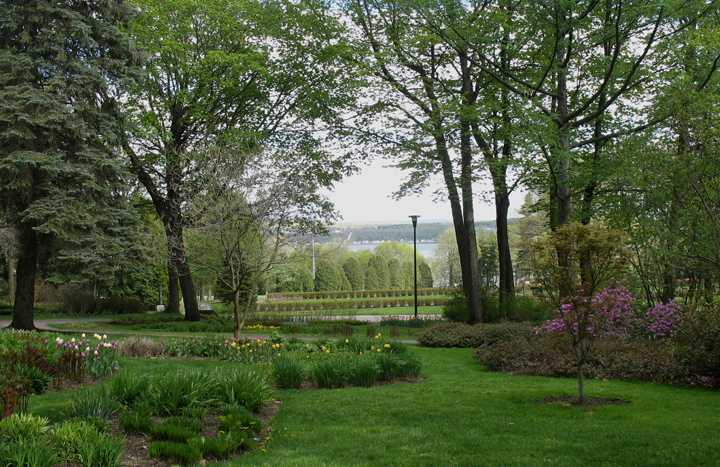 Parc du Bois-de-Coulonge, parc public situé à Québec dans l'arrondissement de Sainte-Foy–Sillery–Cap-Rouge au 1215, Grande Allée Ouest.